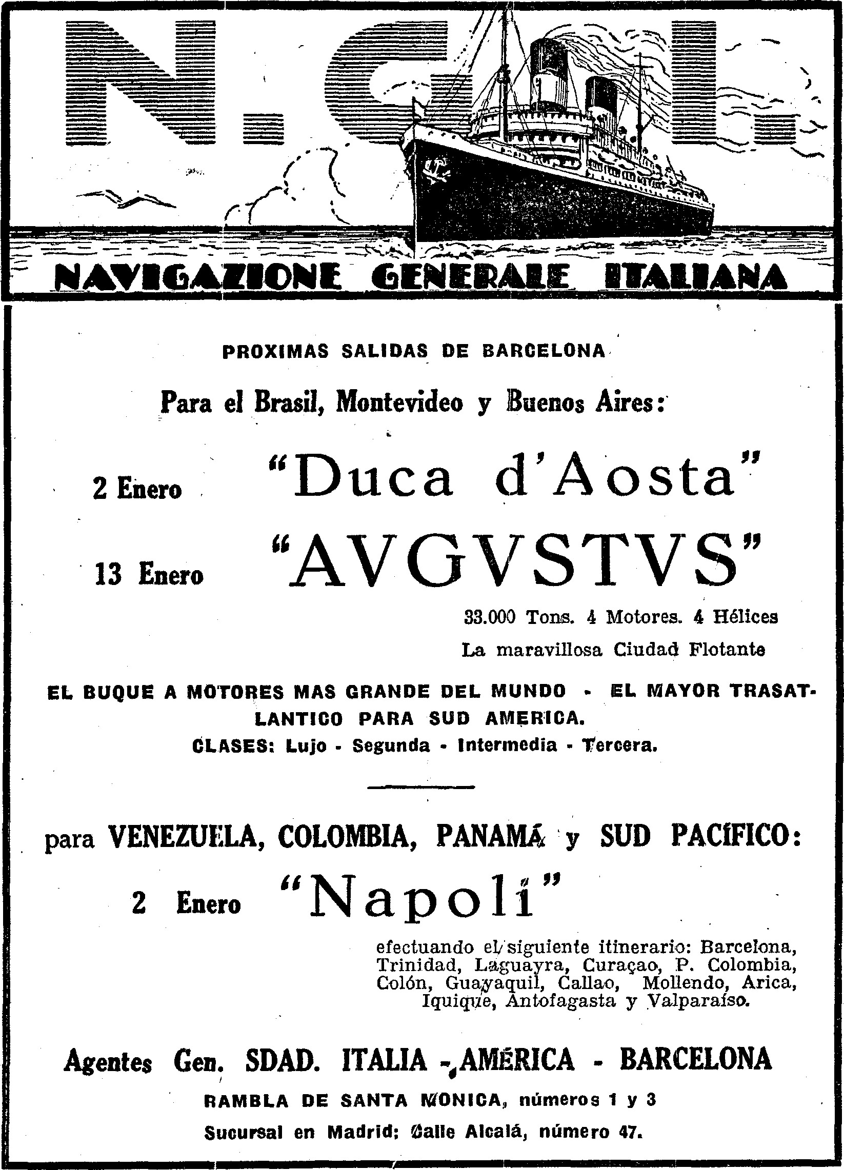 Navigazione Generale Italiana annuncio pubblicitario della partenza delle motonavi DUCA D'AOSTA e AUGUSTUS dal porto di Napoli il 2 e il 13 gennaio 1927 dirette in Venezuela, Colombia, Panamà e Sud Pacifico. Agente Gen. SDAD. - Italia - America - Barcellona Rambla de Santa Monica, 1 e 3 succursale a Madrid calle Alcalà, 47.